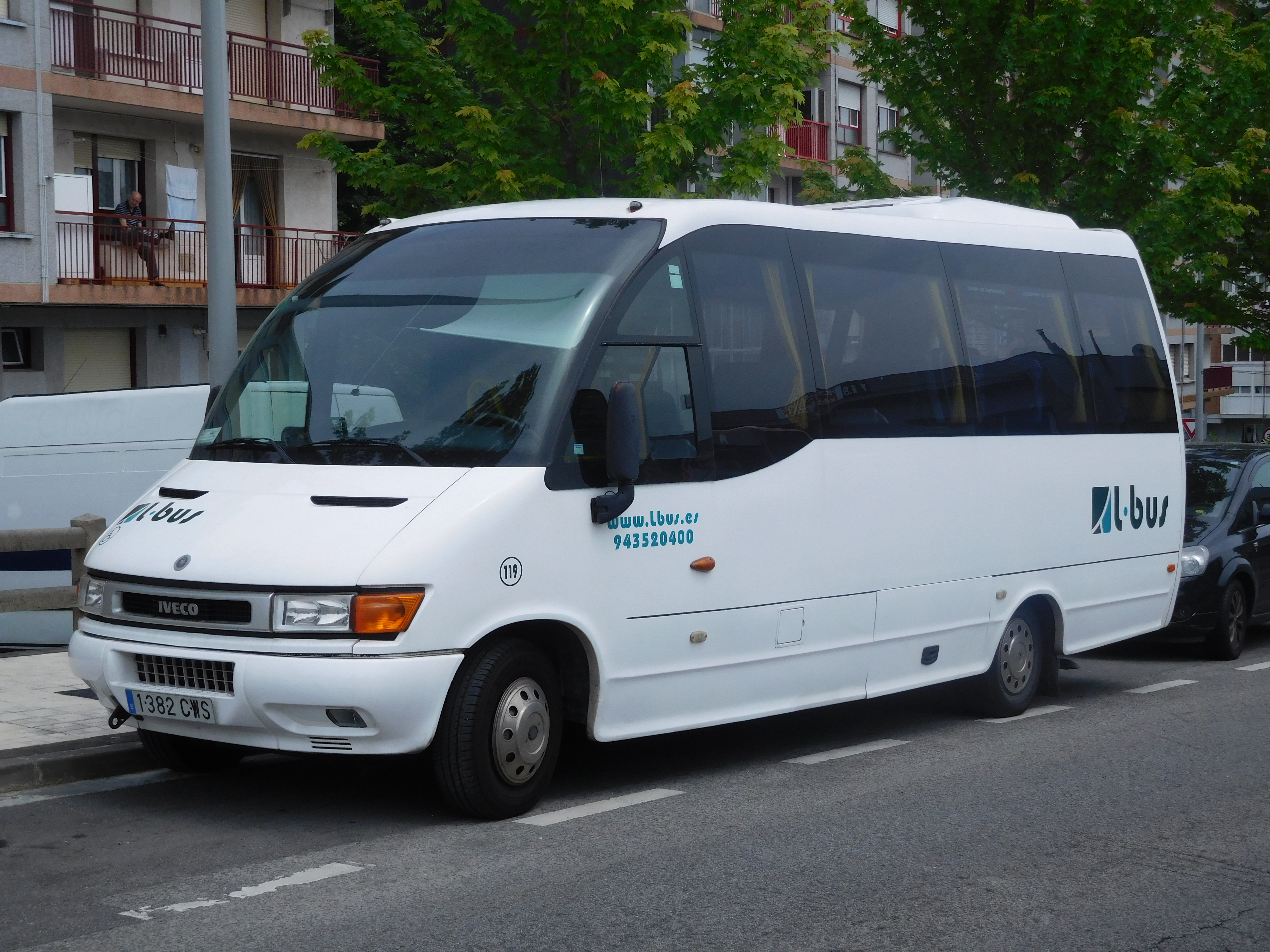 June 2016.